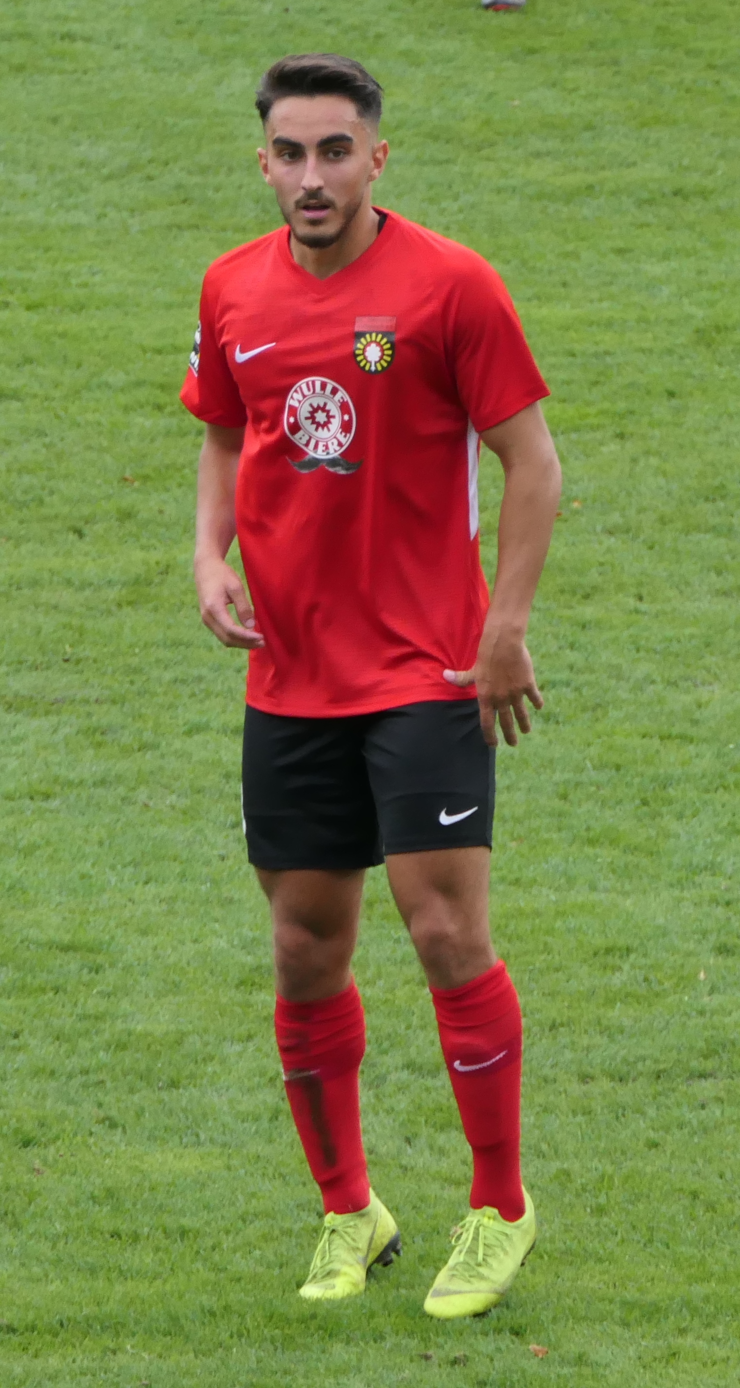 Der Fussballprofi Onur Ünlücifci im Trikot der SG Sonnenhof Großaspach beim Heimspiel gegen Eintracht Braunschweig am 27.10.2019.